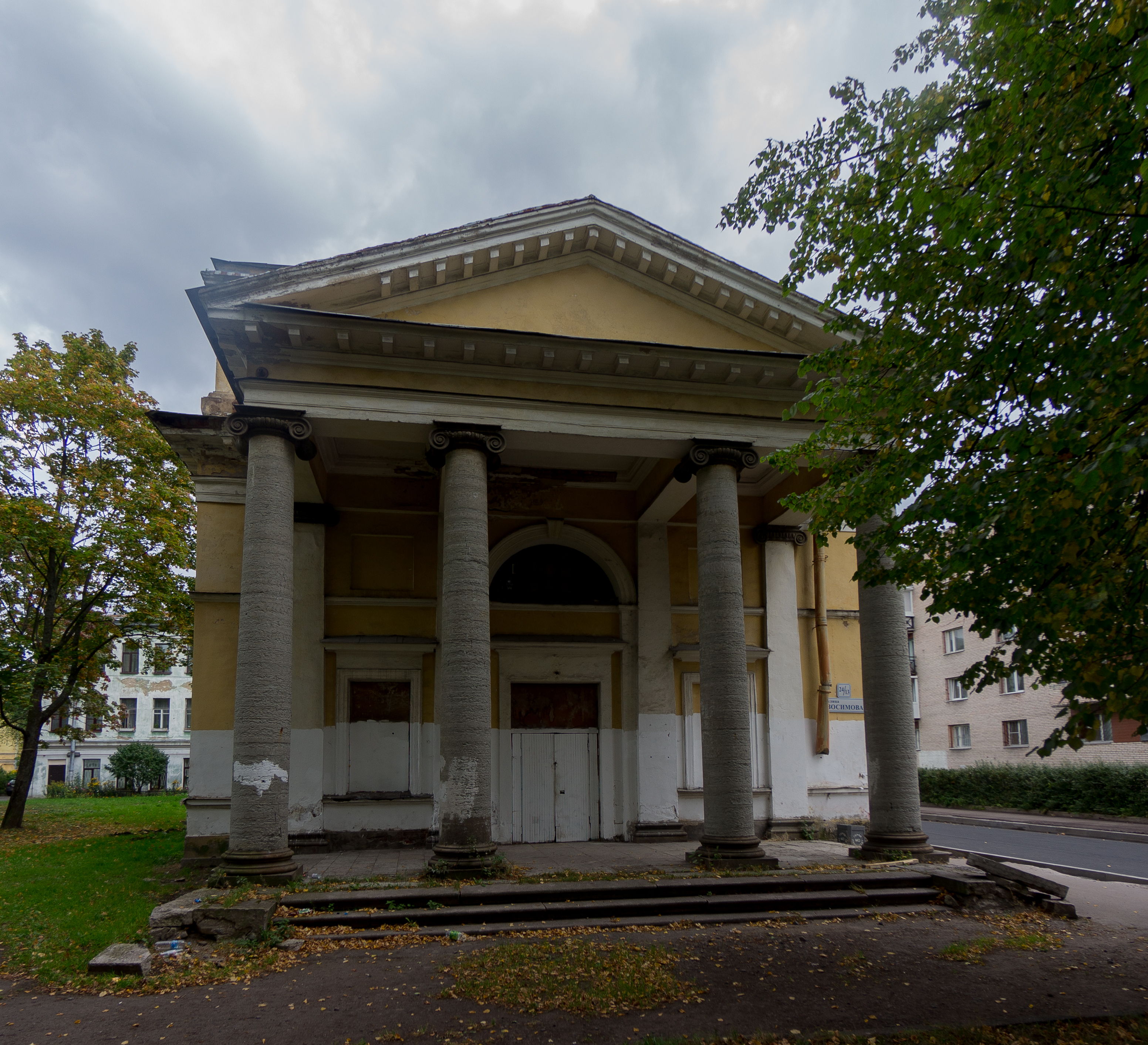 Церковь англиканская: улица Зосимова, 24, Андреевская улица, 13, Кронштадт, Кронштадтский район, Санкт-Петербург